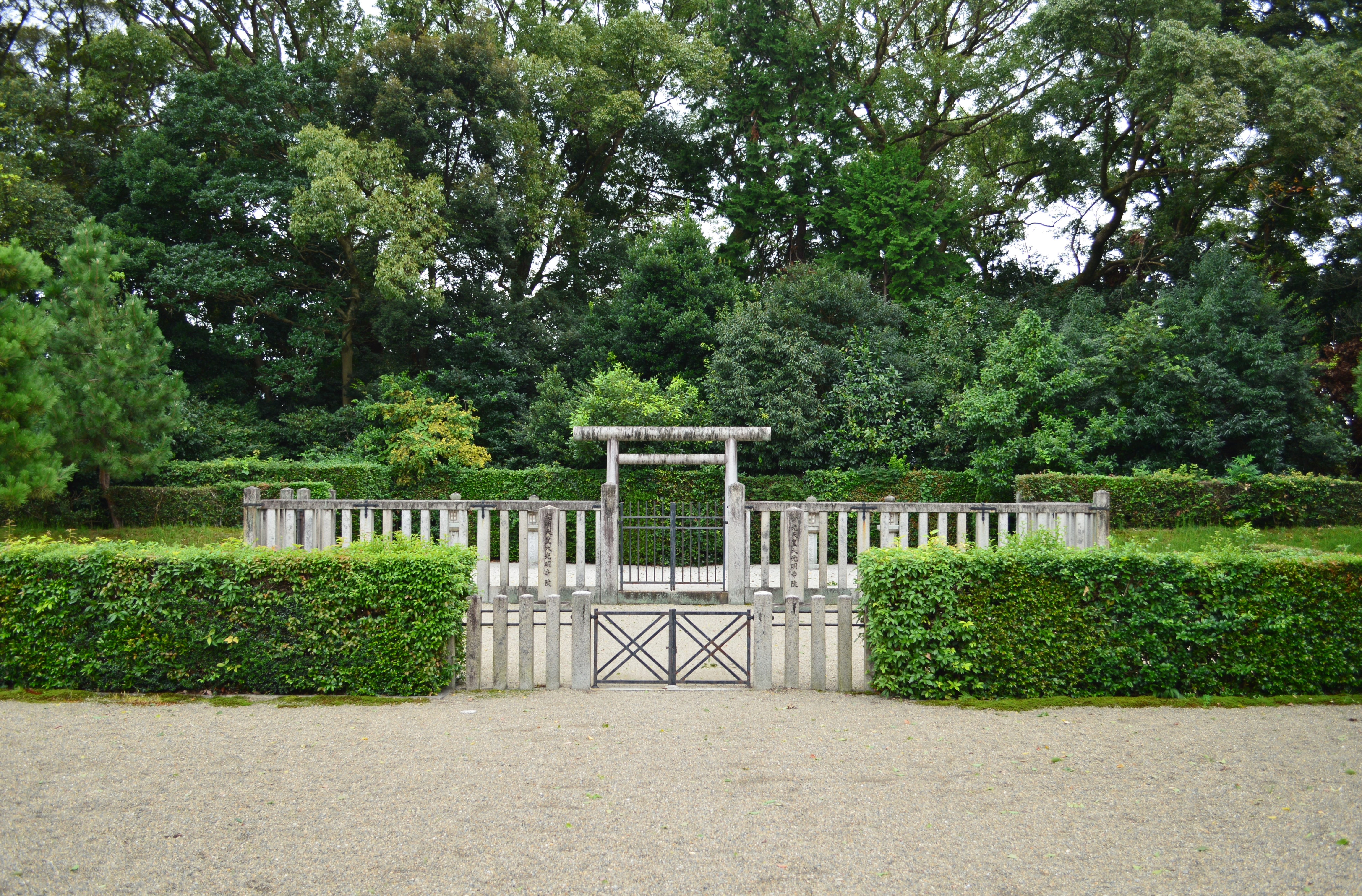 光明天皇崇光天皇 大光明寺陵・治仁王墓 拝所